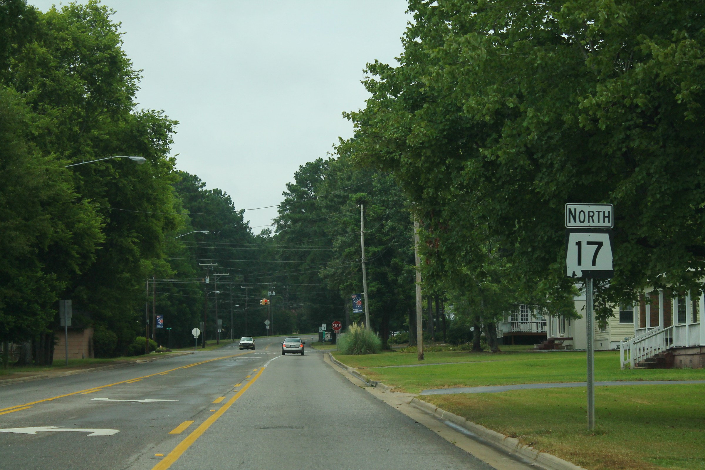 AL17nRoadSign4-Aliceville